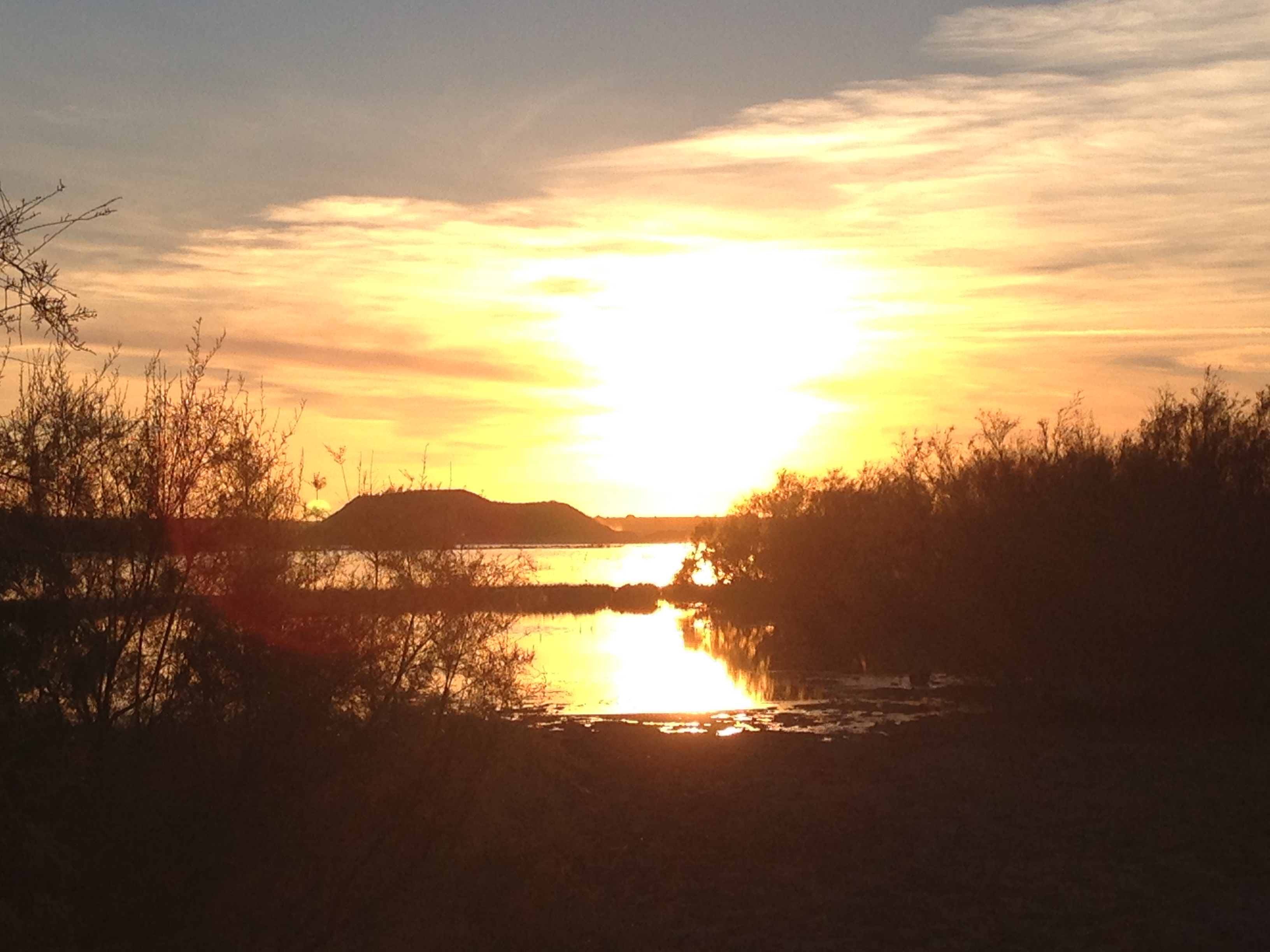 Laguna de Los Tollos This is a photography of a Site of Community Importance in Spain with the ID: ES6120011. Natura2000 entry, EEA entry